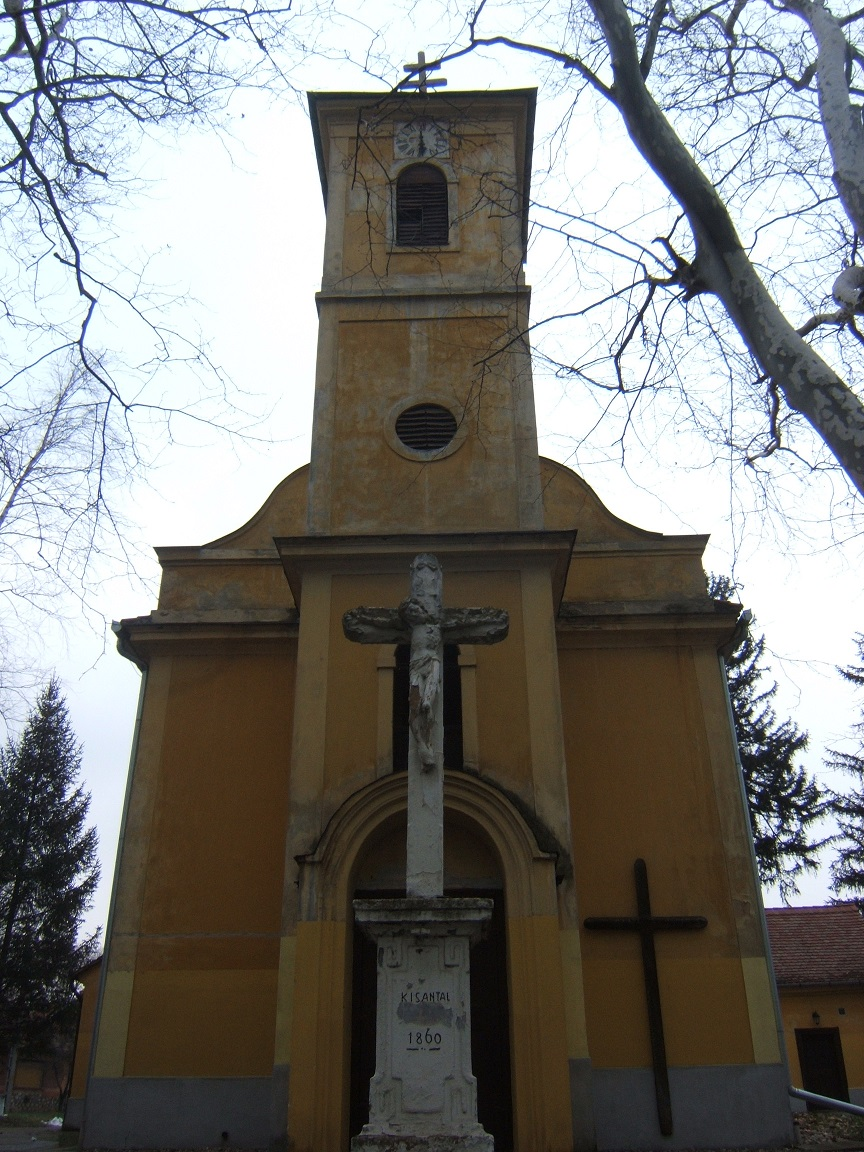 Kaposvár-Toponár műemlék temploma